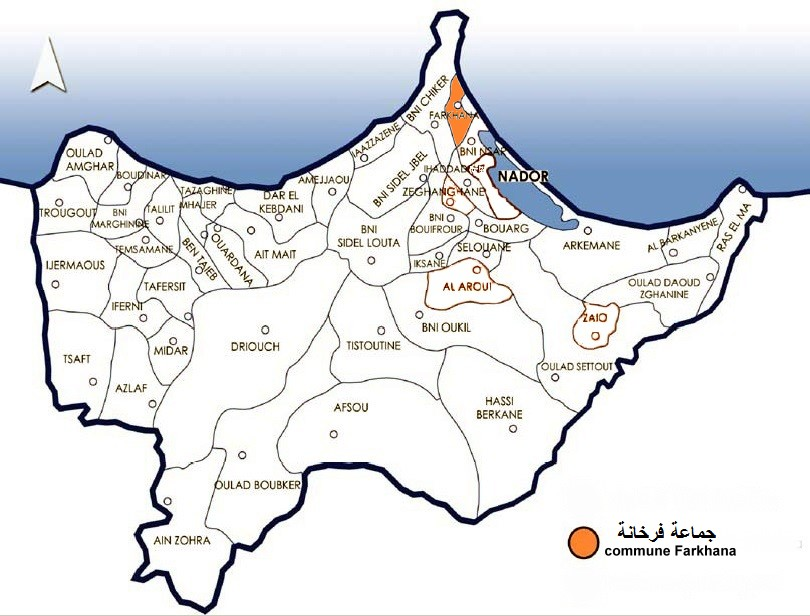 جماعة فرخانة commune Farkhana